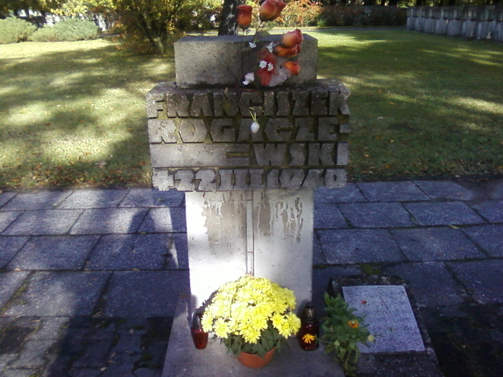 Nagrobek ks. Franciszka Rogaczewskiego na zbiorowej mogile Cmentarz Zasłużonych Gdańsk Zaspa. Nagrobek postawiony w miejscu zbiorowych mogił, w których spoczywa ks. Franciszek Rogaczewski.